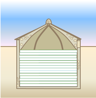 Figura de un nevero artificial